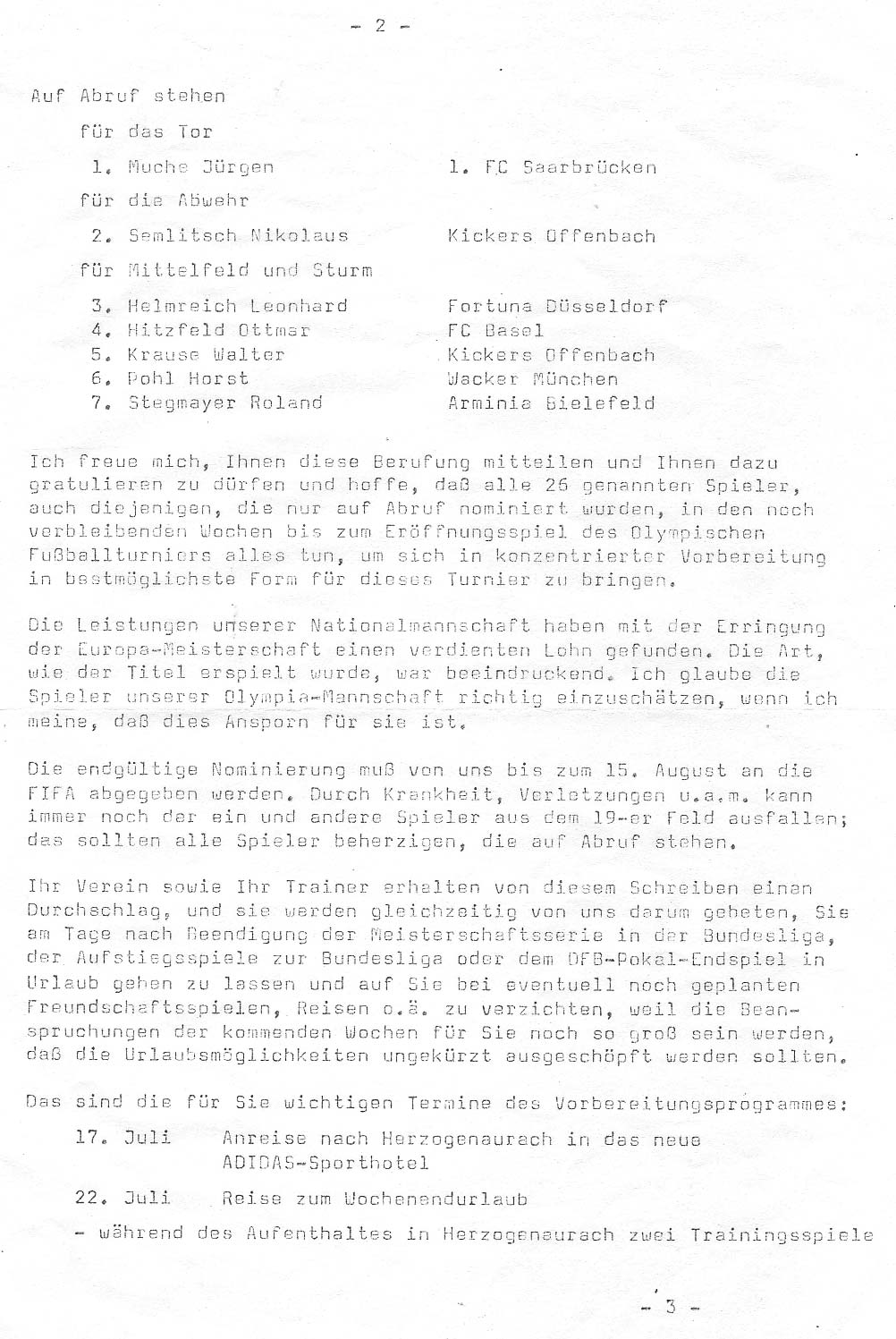 Berufung der Fußball-Olympiamannschaft des DFBs 1972.